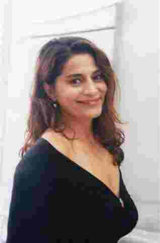 L'attrice Rosa Pianeta in una recente immagine